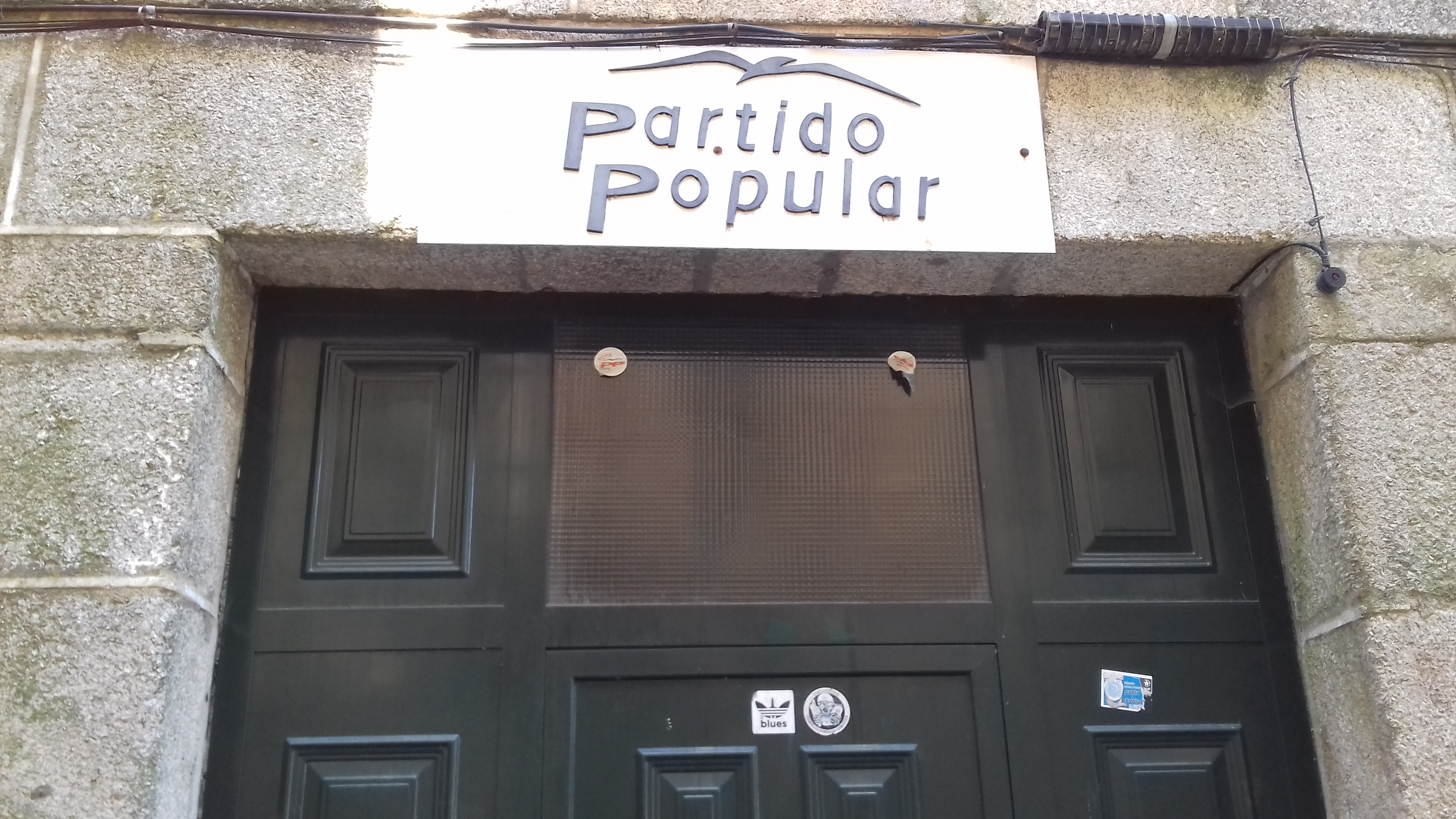 Sede do Partido Popular en Ribadavia, na rúa Yáñez nº 3